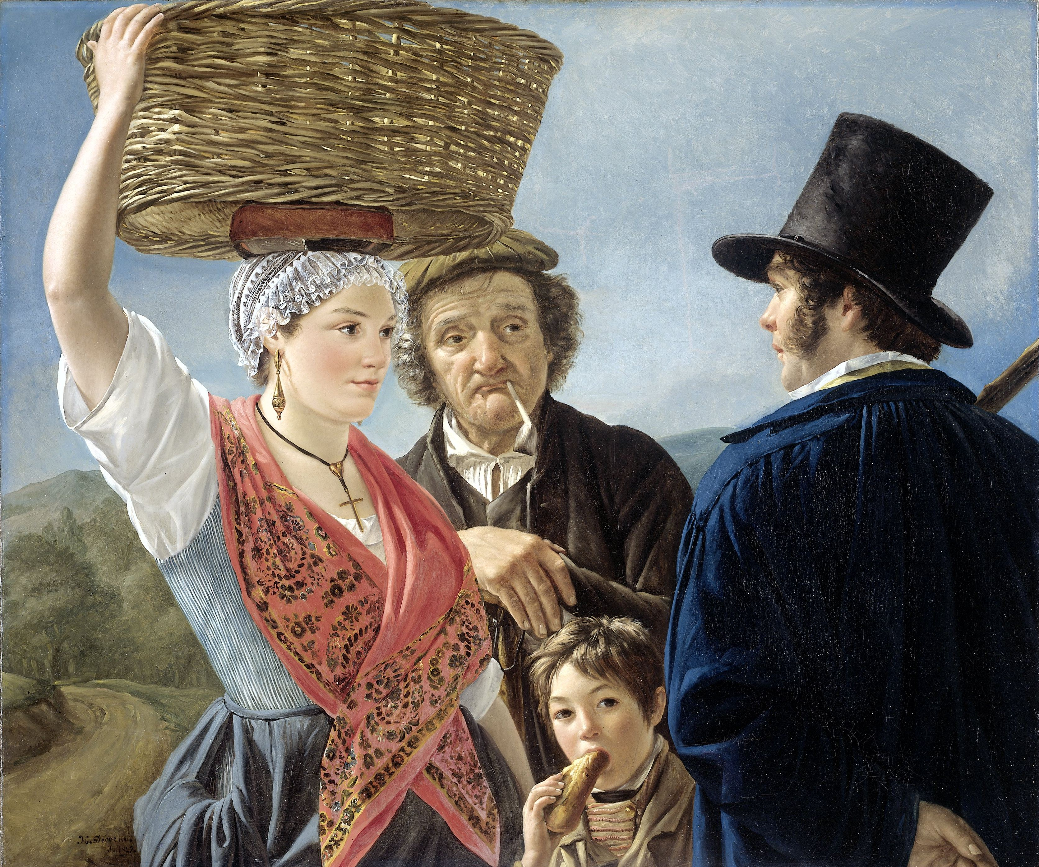 Marktnieuws. Een jonge vrouw met een mand op haar hoofd in gesprek met een jonge man met hoge hoed. Een oude man met pijp luistert toe, ook een jongen die een stuk koek eet.